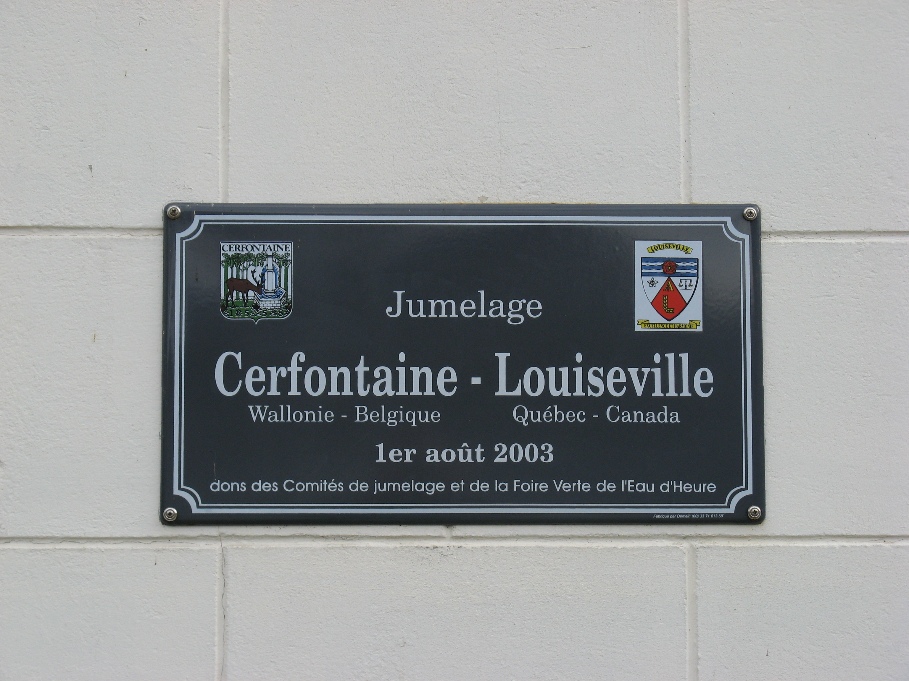 Plaque commémorative du Jumelage entre Cerfontaine (Wallonie, Belgique) et Louiseville (Québec, Canada) en 2003